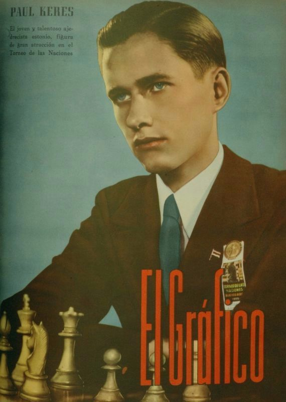 Пауль Керес під час шахової олімпіади в Буенос-Айресі. El Gráfico №1054 за 8 вересня 1939